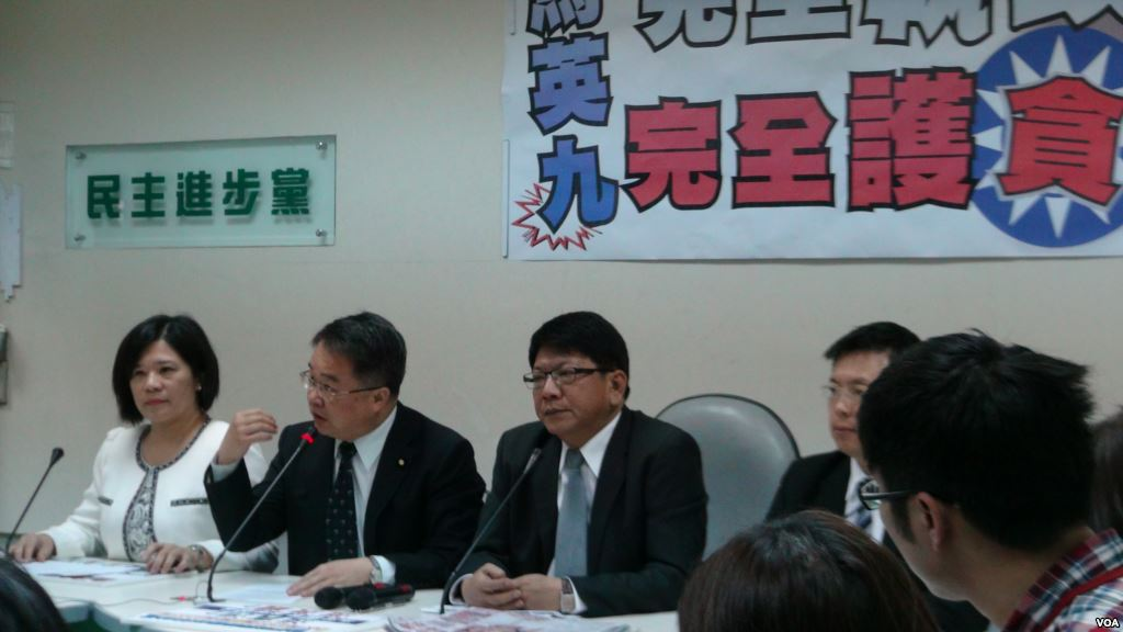 民進黨立委就林益世索賄案召開記者會。